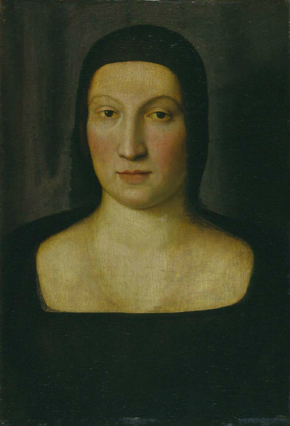 Portrait of Emilia Pia da Montefeltro